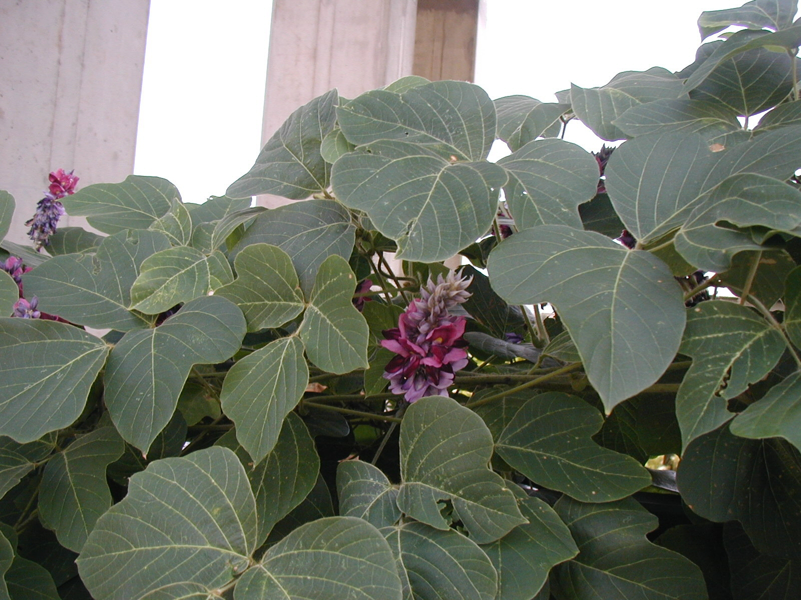 クズ:Pueraria_lobata; taken by Miya in Kawanishi-city, Hyogo, Japan.